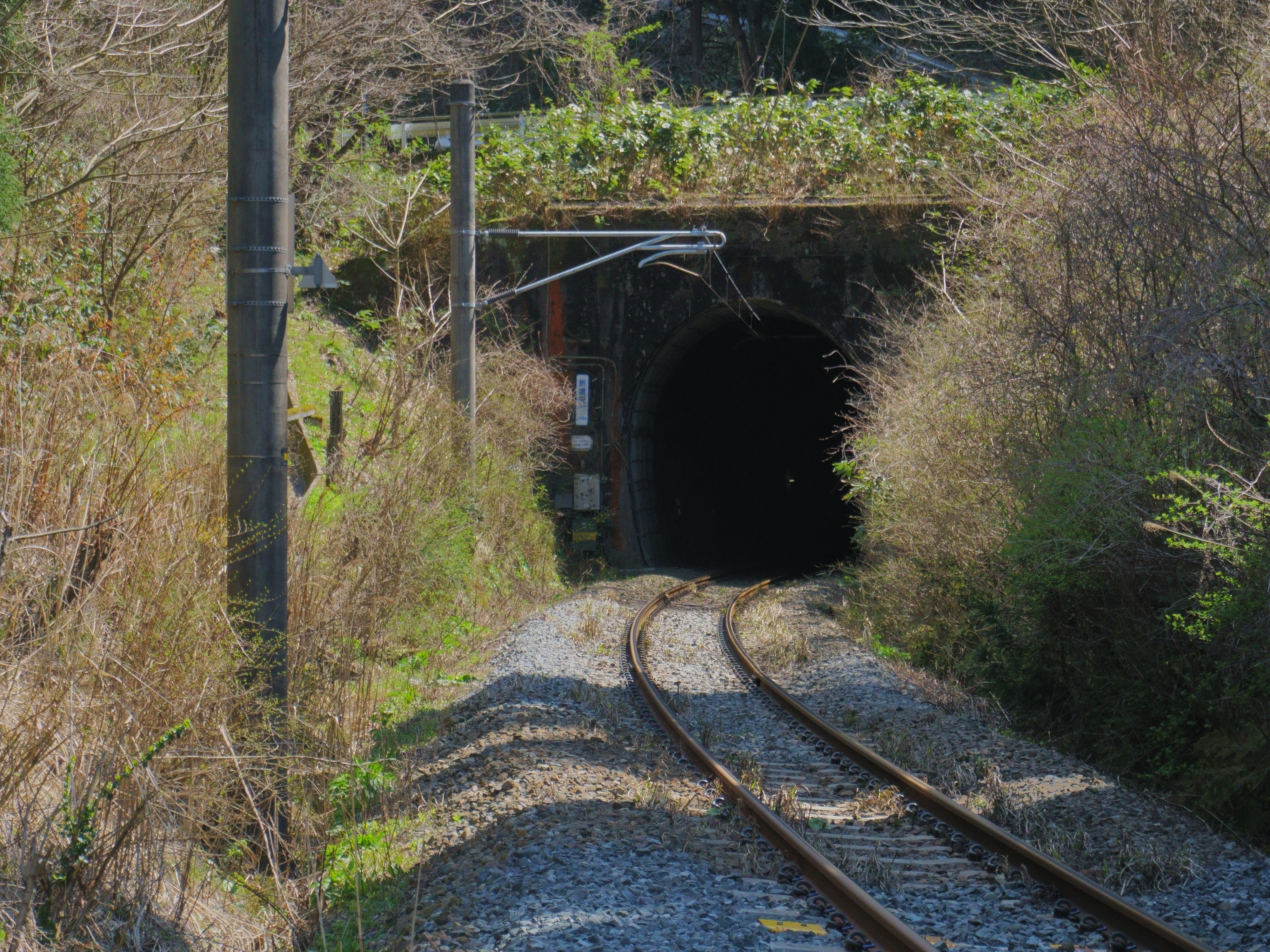 羽越本線・折渡トンネル（秋田県由利本荘市、羽後岩谷 - 折渡間）。折渡方（秋田方）坑口より。1924年に貫通したこのトンネルは難土質のため日本で初めてシールド工法を採用したが、施工管理の難しさから中途で断念され、在来の工法に切り替えられた。1971年に複線化のため新たなトンネルが開通し、こちらは下り線用のトンネルとなった。